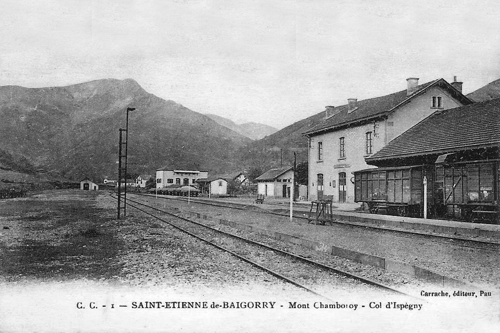 Intérieur de la gare terminus de Saint-Étienne-de-Baïgorry vers 1910.